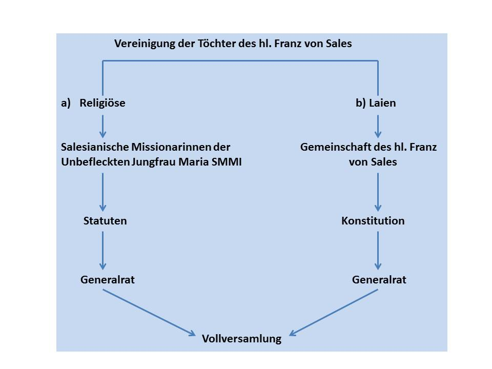 Gliederung und Organisation der Gemeinschaft des hl. Franz von Sales